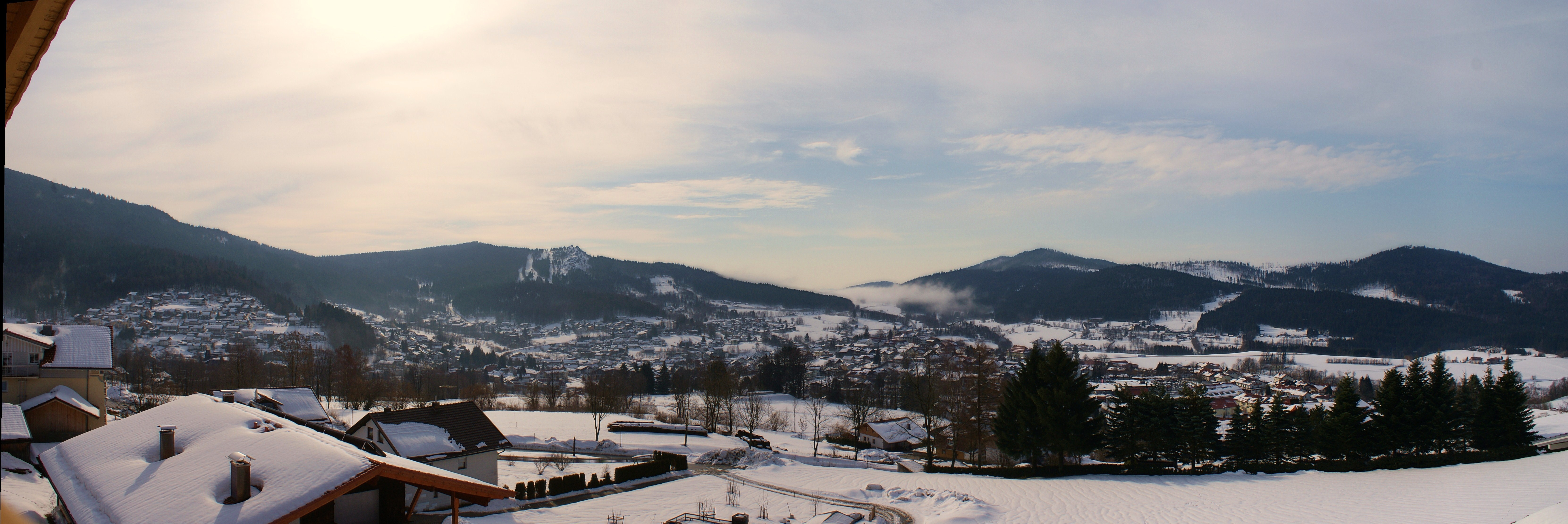 Panoramablick im Winter über Bodenmais